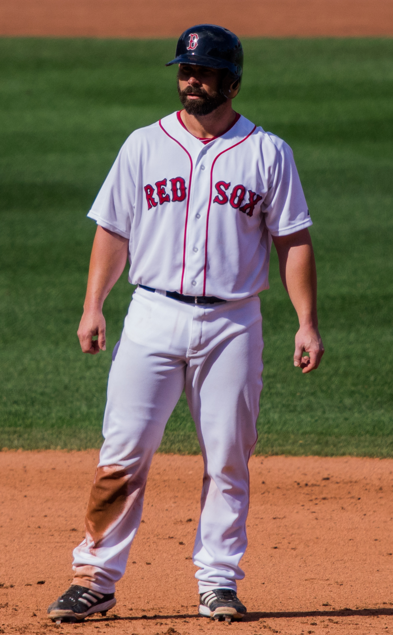 Dan Butler